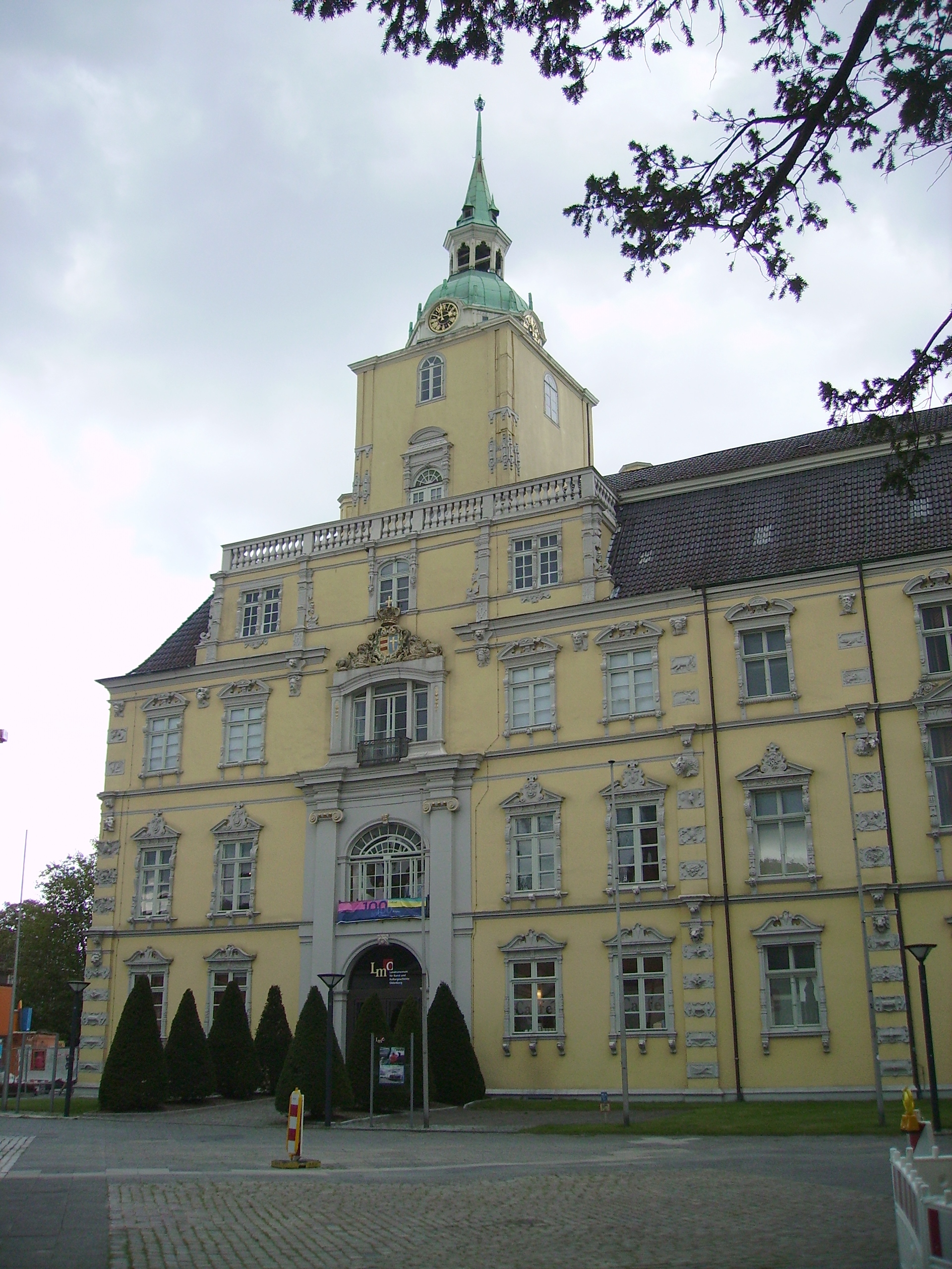 Landesmuseum Oldenburg